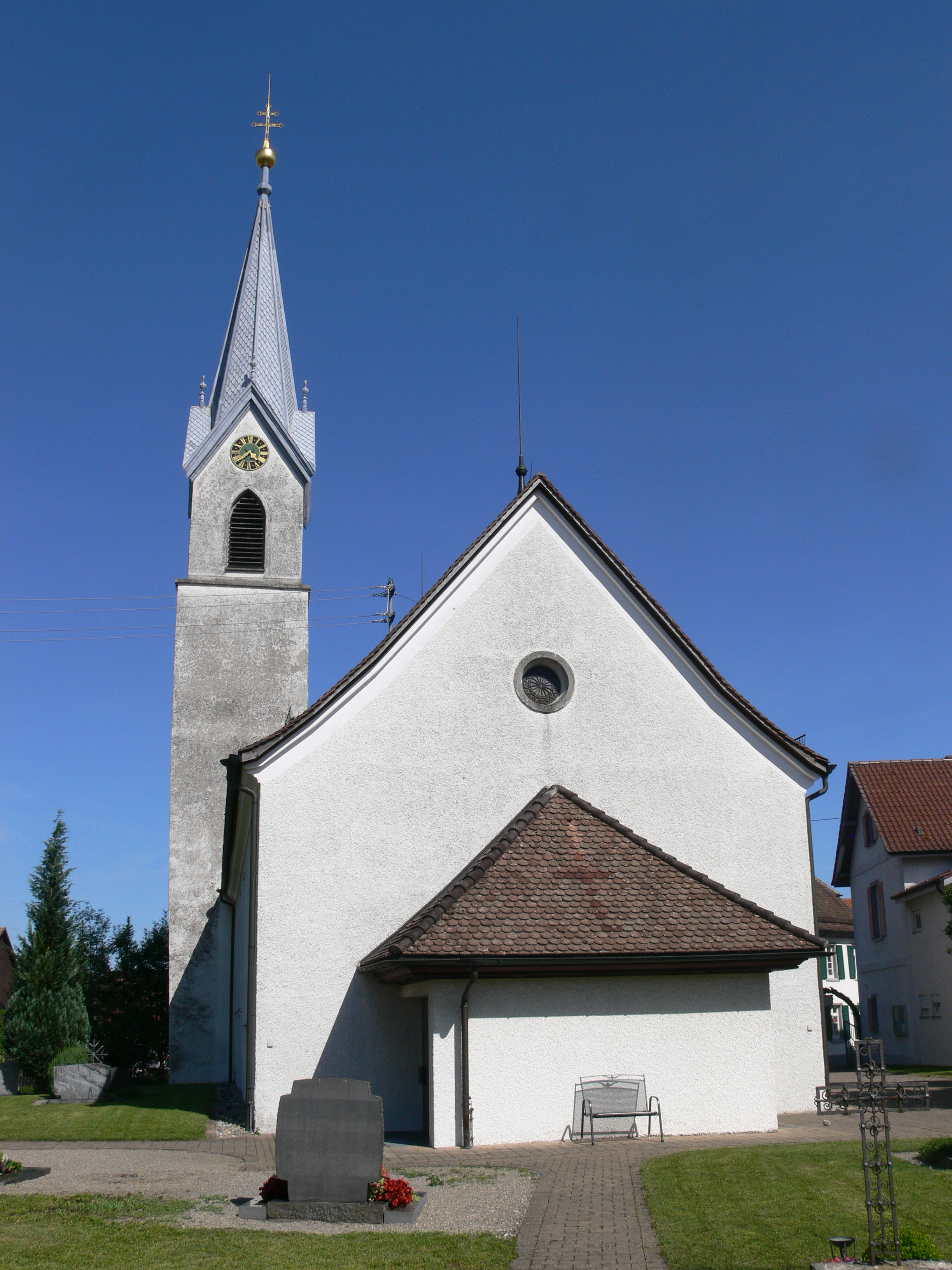 Ettenkirch, Stadt Friedrichshafen, Bodenseekreis: Pfarrkirche St. Peter und Paul